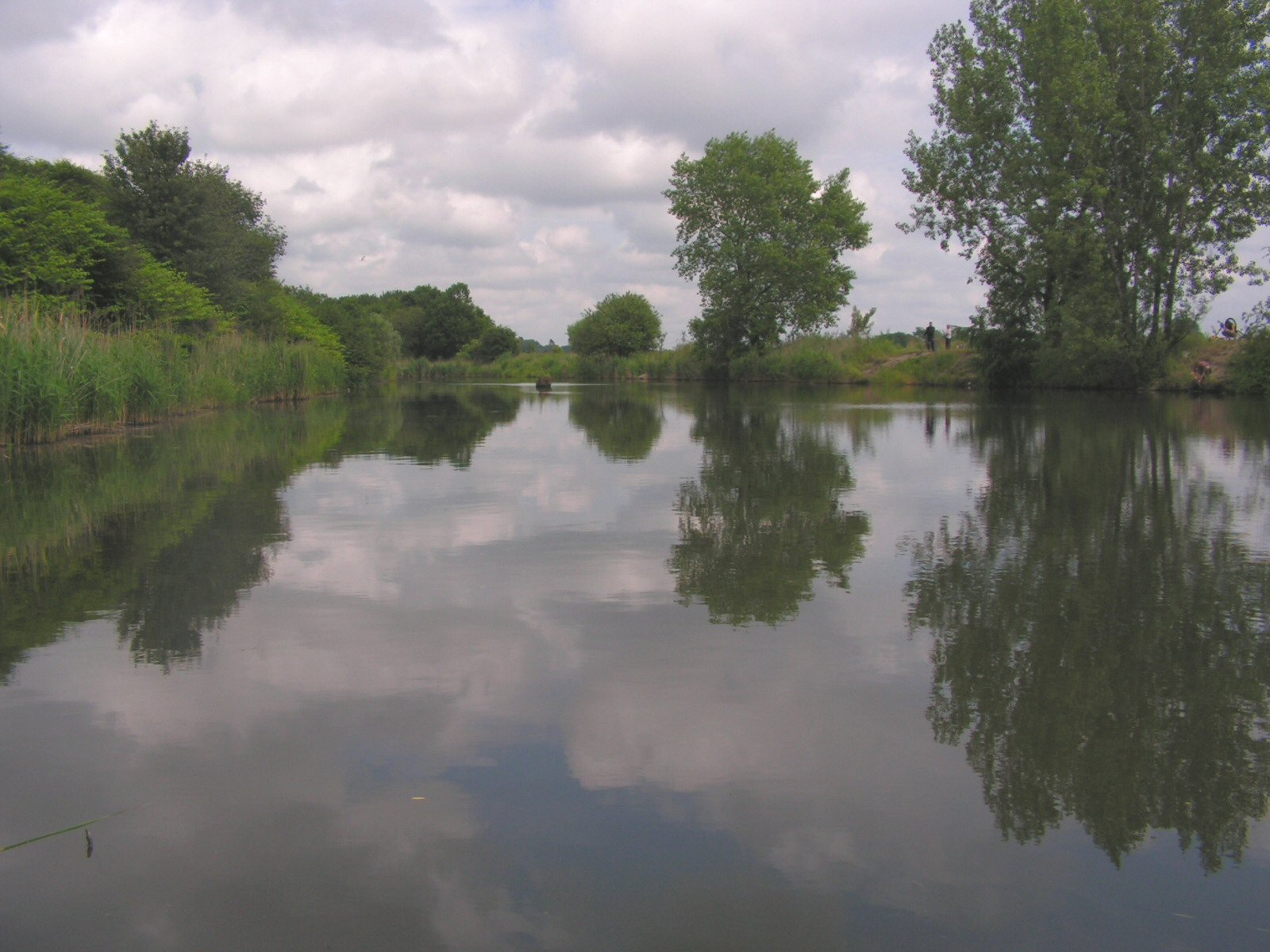 Żabie Doły - Fot. Artur Wójtowicz